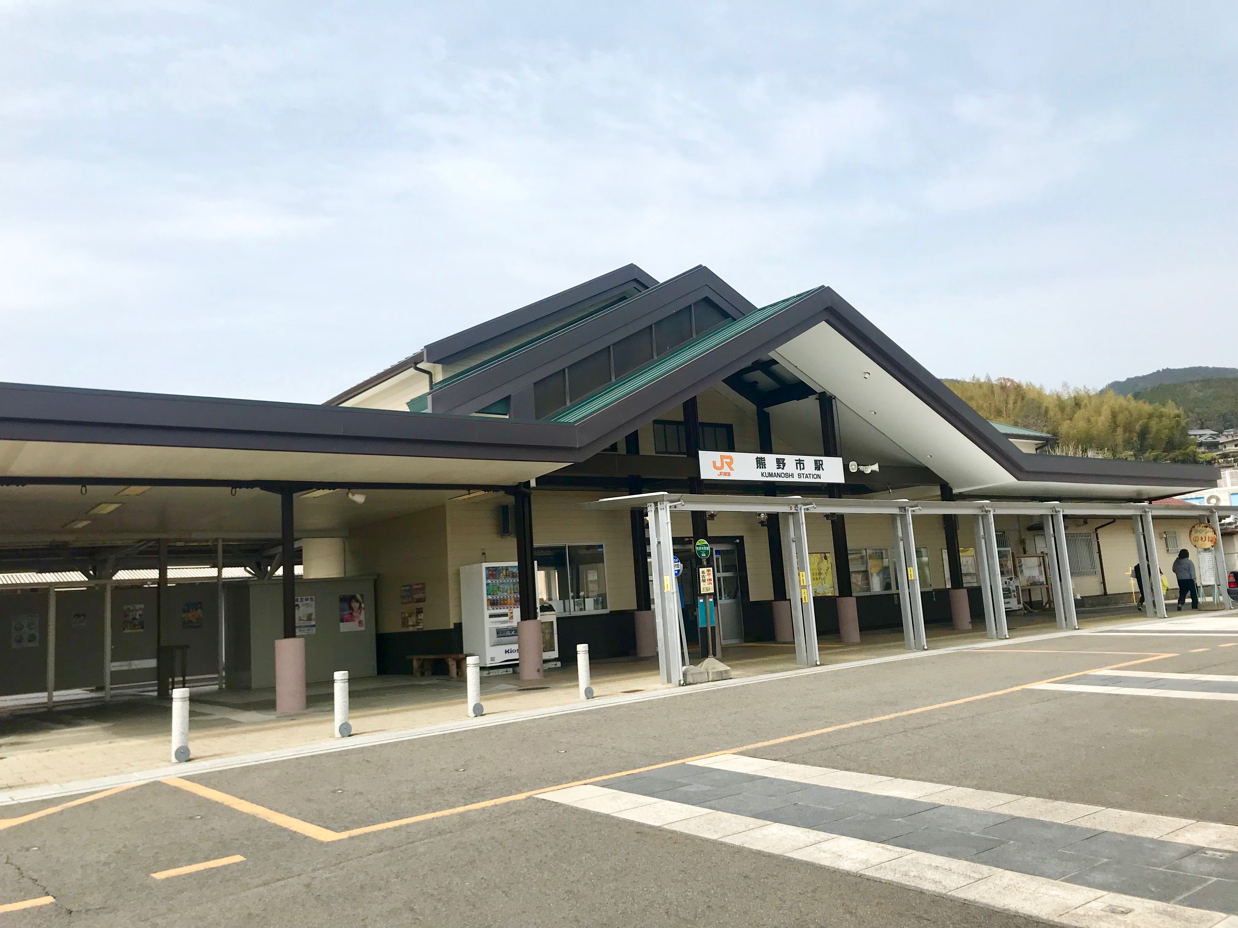 熊野市駅駅舎（2019年3月撮影）